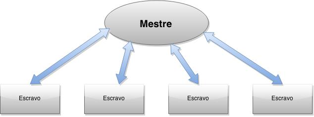 mestre escravo simple